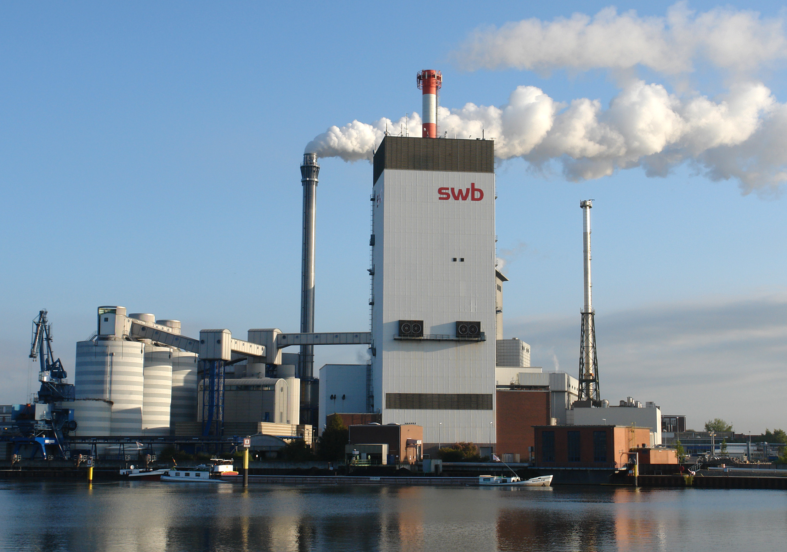 Kraftwerk Hastedt der swb AG, Ansicht Weserseite